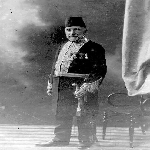 מר ולרו, מראשי העדה הספרדית בירושלים ( בנקאי בתקופת השלטון הטורכי) , ( 1909) .